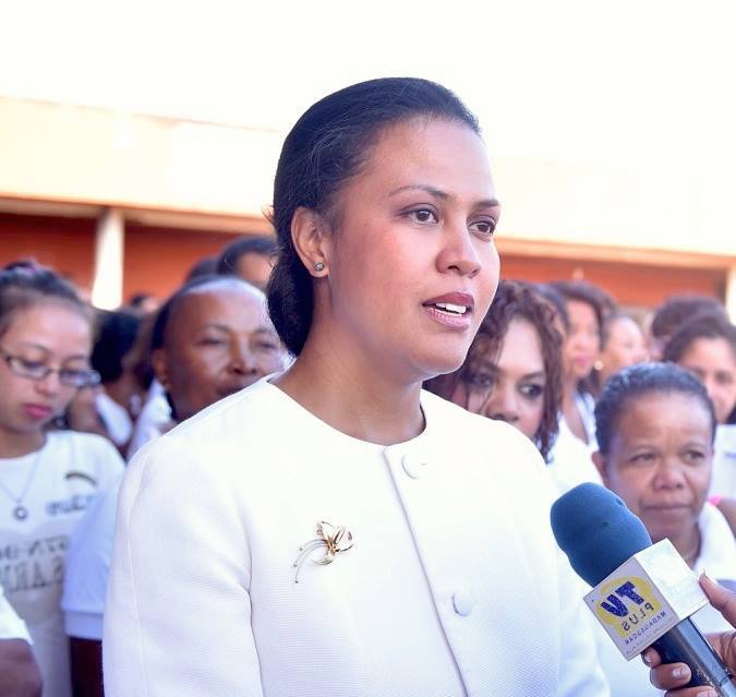 Interview de Harilala Ramanantsoa